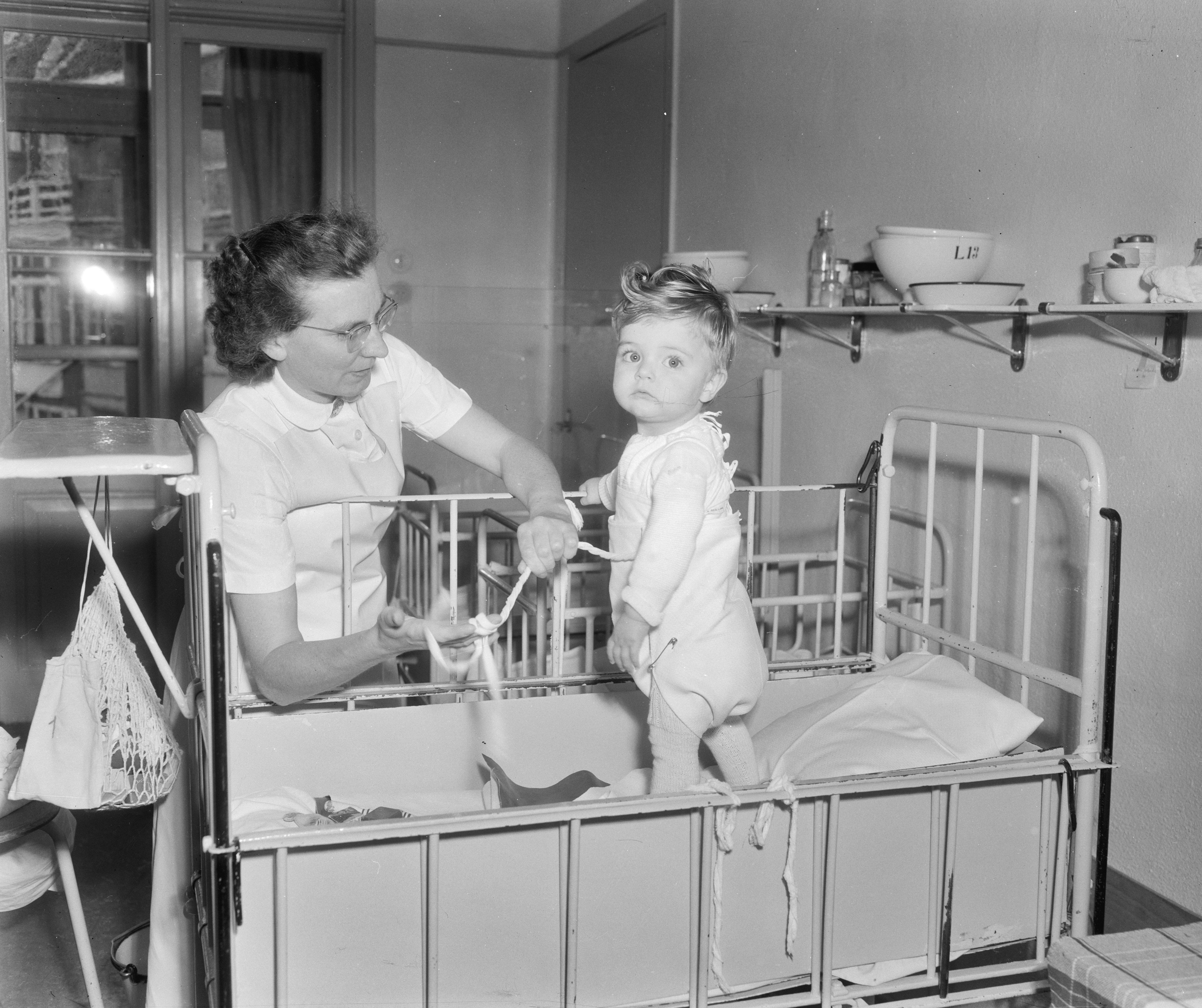 Consultatiebureau voor Zuigelingen Regentesselaan Den Haag